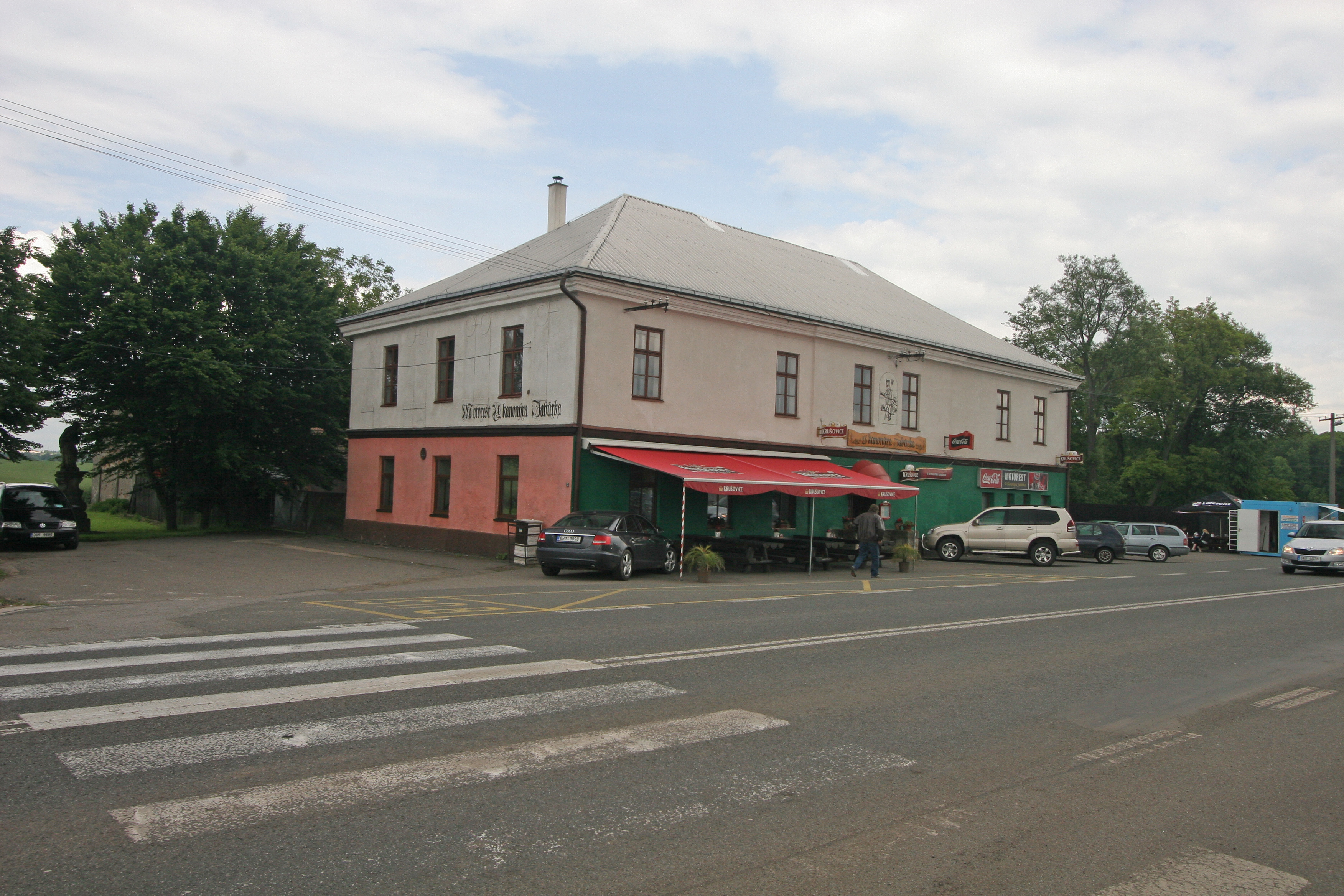 Sadová - hostinec U kanonýra Jabůrka